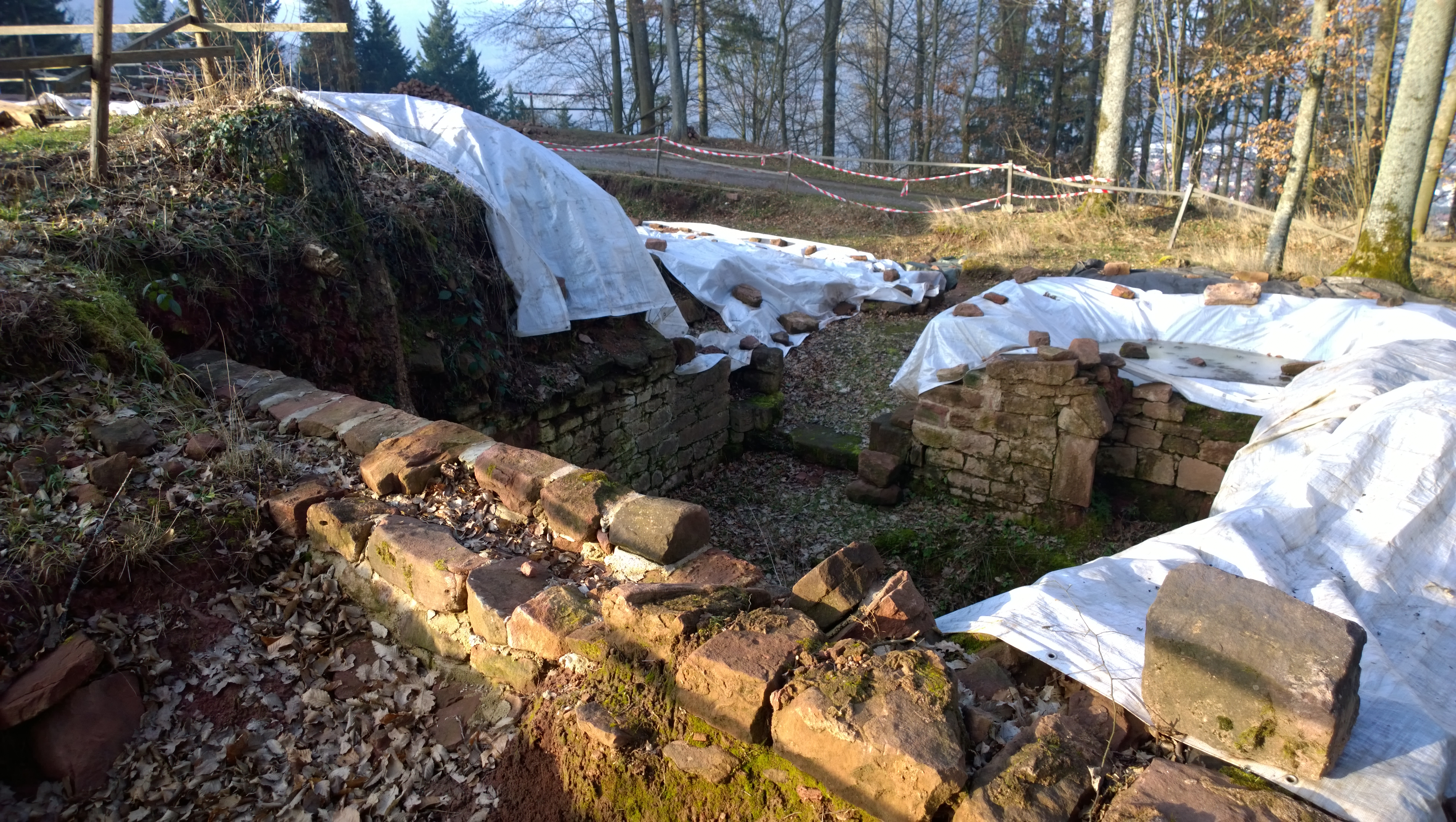 Ausgrabungen auf dem Gotthardsberg zwischen Amorbach und Weilbach (Lkr. Miltenberg, Unterfranken) zur Burg Frankenberg